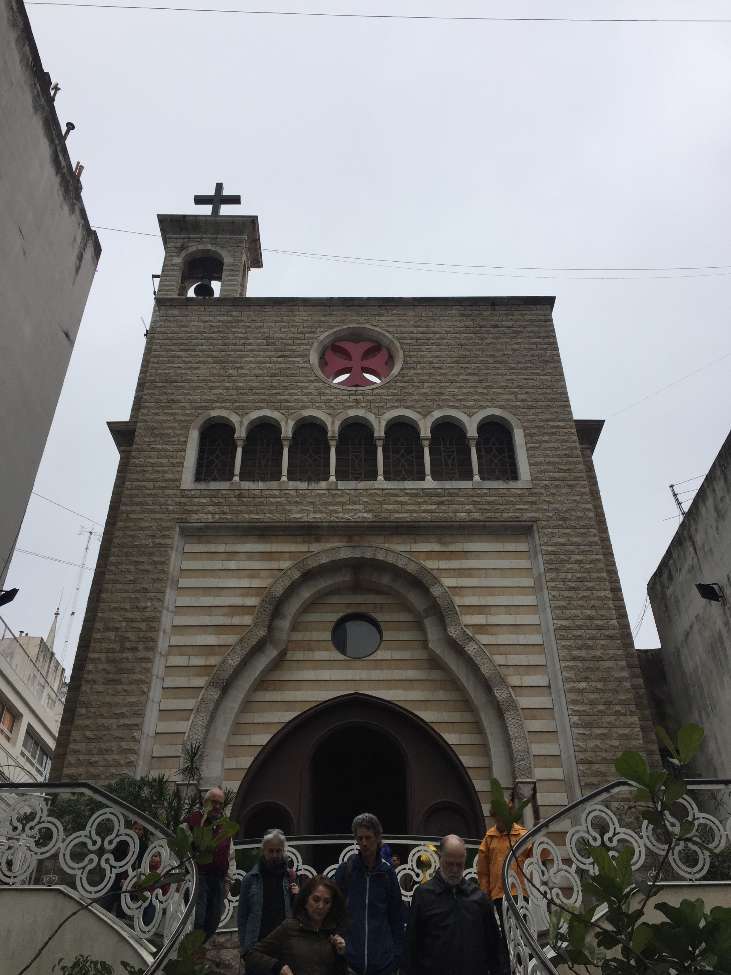 Fachada principal de la catedral católica maronita de San Marón, Buenos Aires, Argentina.